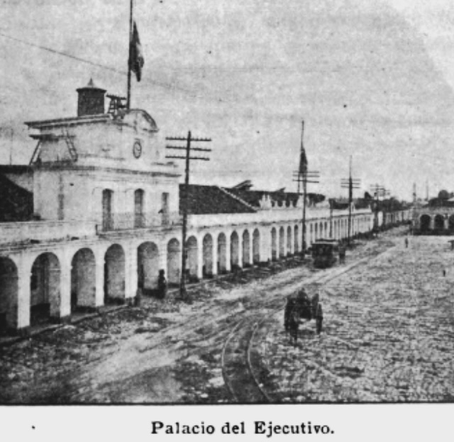 Palacio gubernamental en 1907.